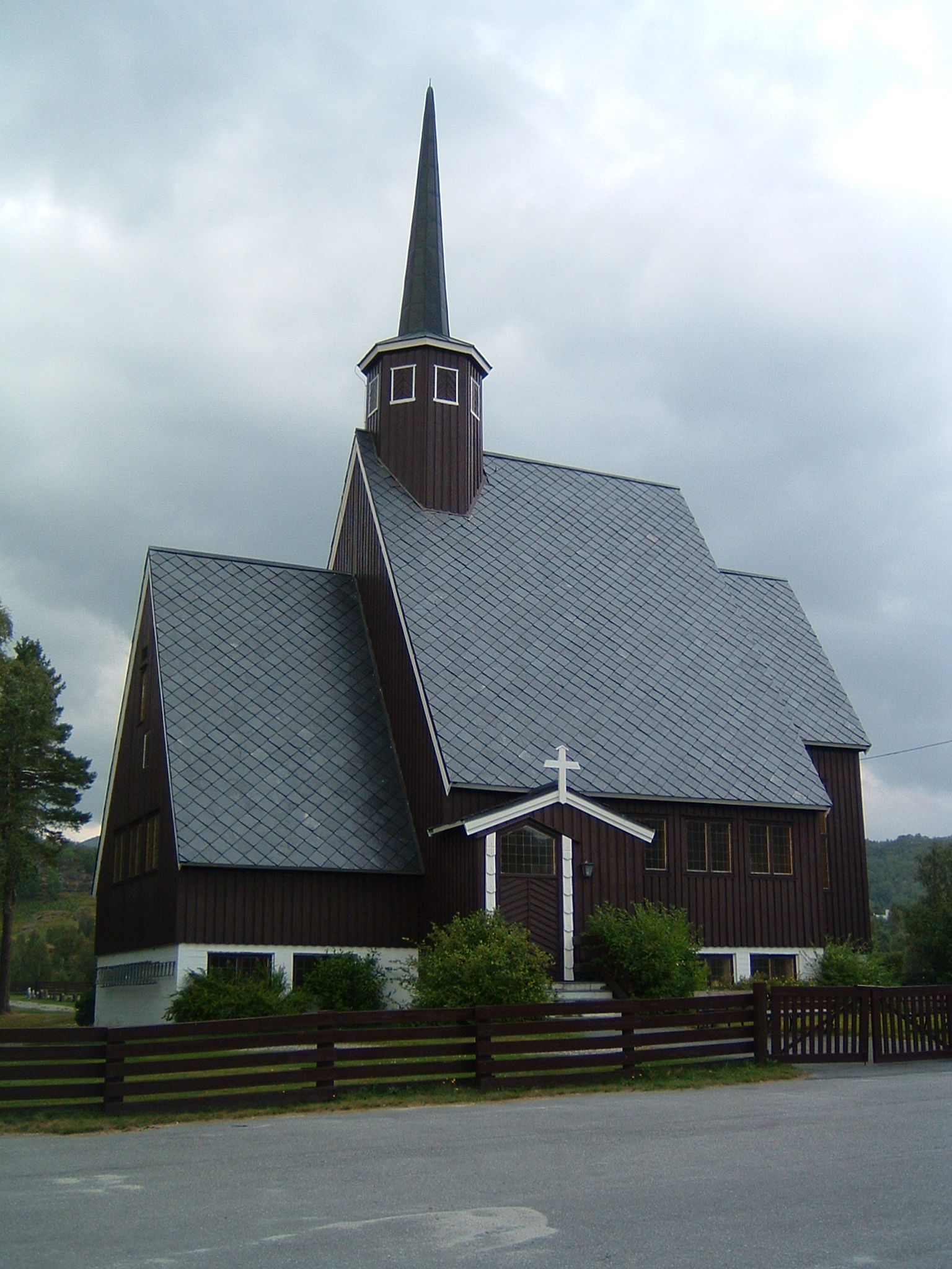 Kvævemoen kapell (1962). Architect: Valdemar Scheel Hansteen (1897–1980)